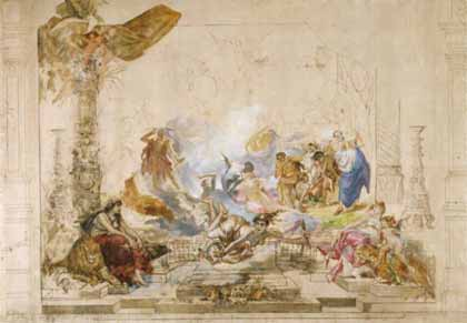 Allegorische Darstellung der Theaterkunst - Entwurf für den Hauptvorhang des K. u. K. Hofburgtheaters; Wien 1888; Mischtechnik: Bleistift u. Öl auf Leinwand; 160 x 230 cm Theaterwissenschaftliche Sammlung der Universität zu Köln (Schloss Wahn), Inv.-Nr. 41207